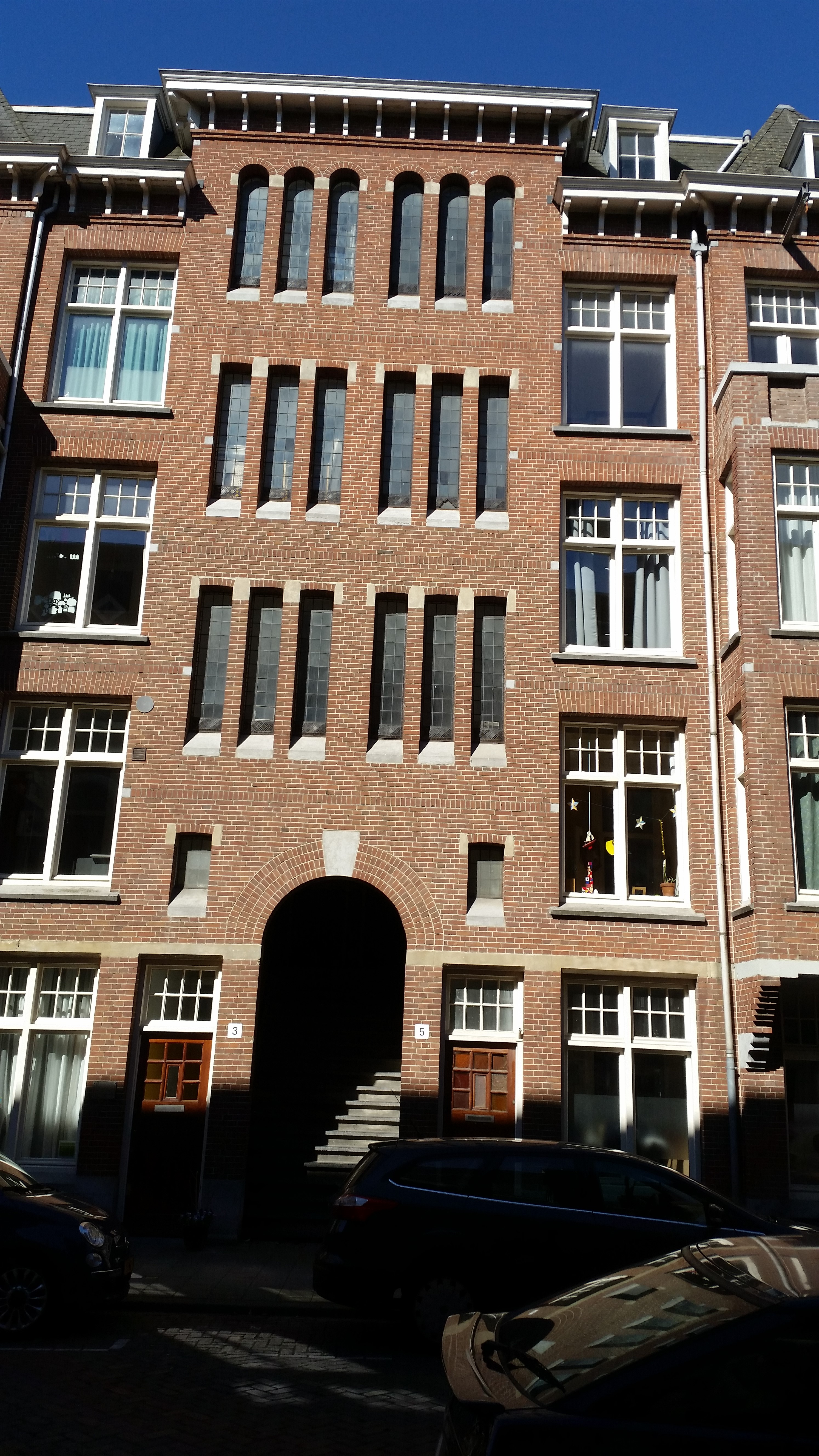 Lumeijstraat nrs. 3 en 5, ingang, Amsterdam-West